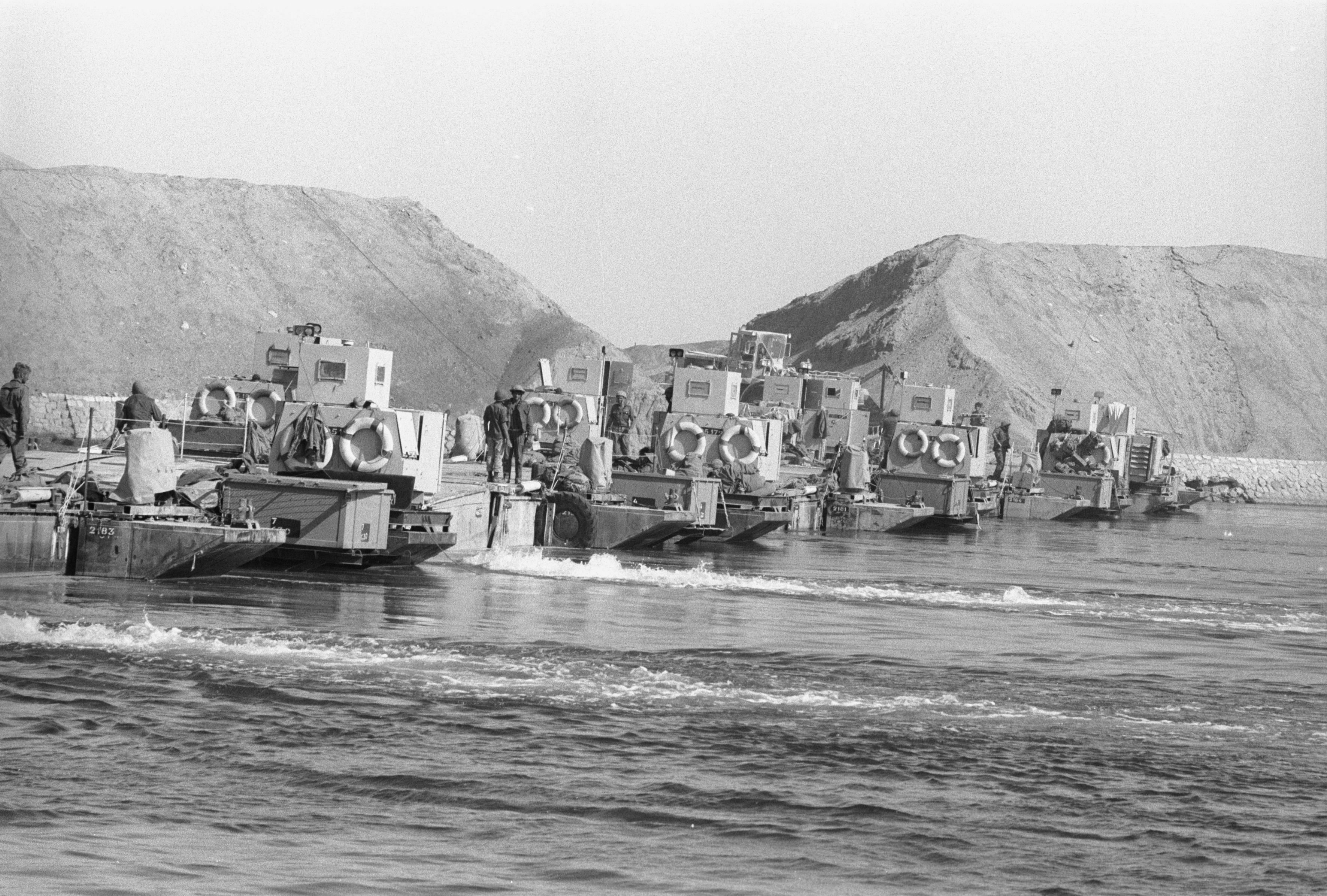 מלחמת יום הכיפורים: בנית גשר הדוברות מעל תעלת סואץ אוקטובר 1973.